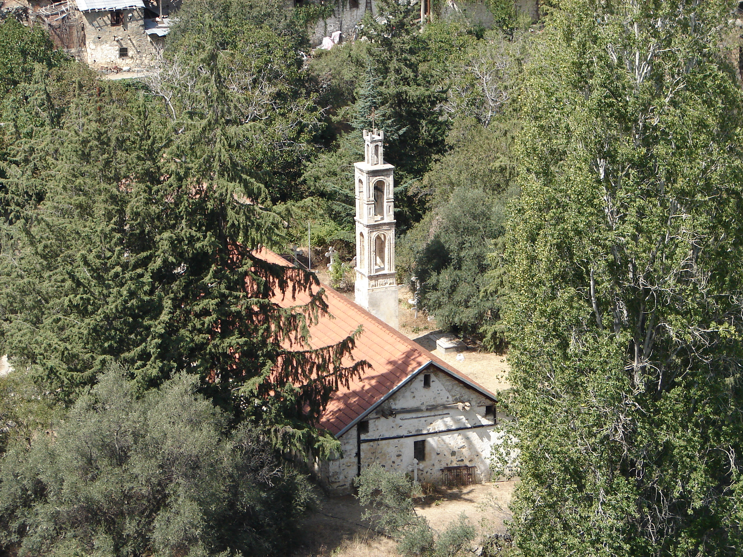 a@a Timios Prodromos Askas